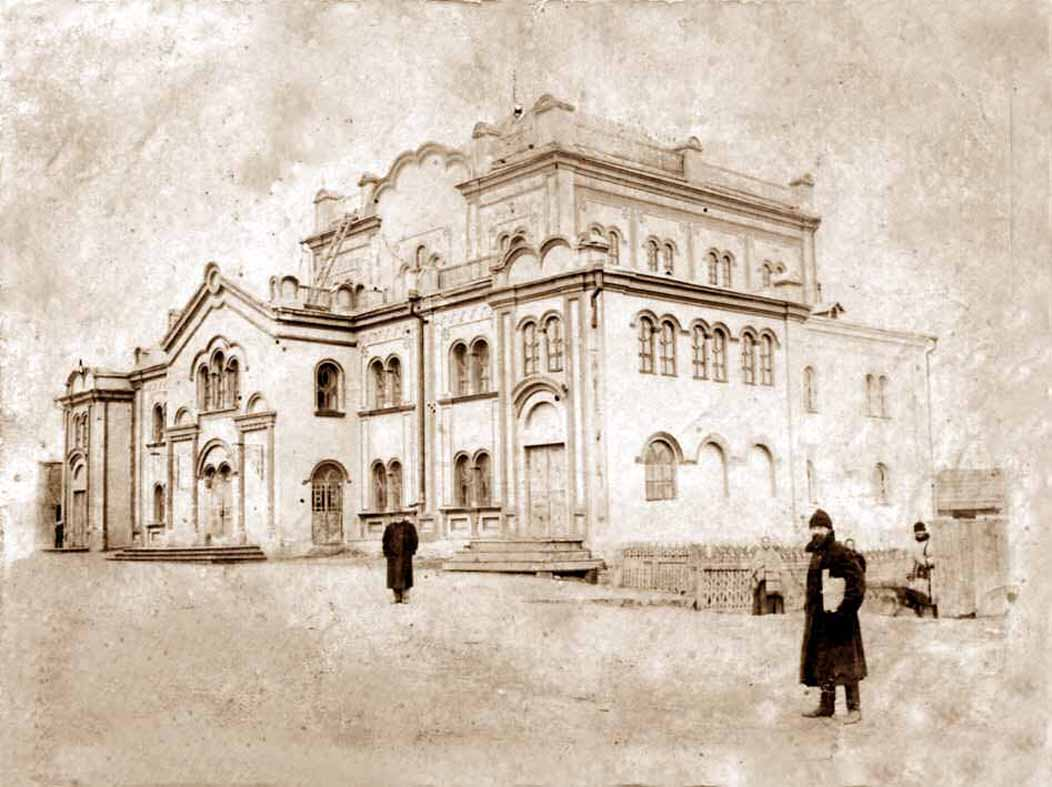 Велика синагога у місті Радомишль.